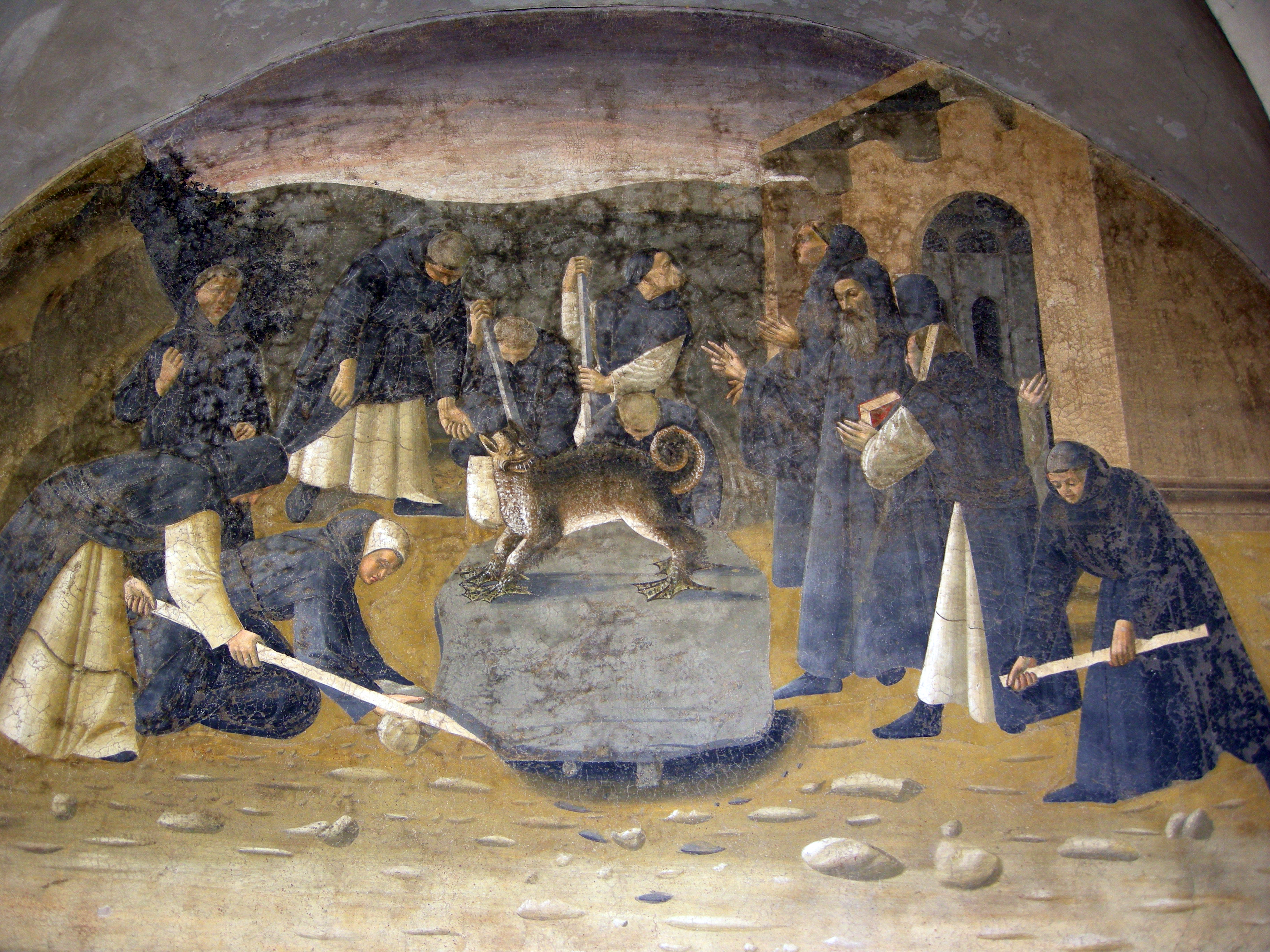 Chiostro degli aranci - Firenze